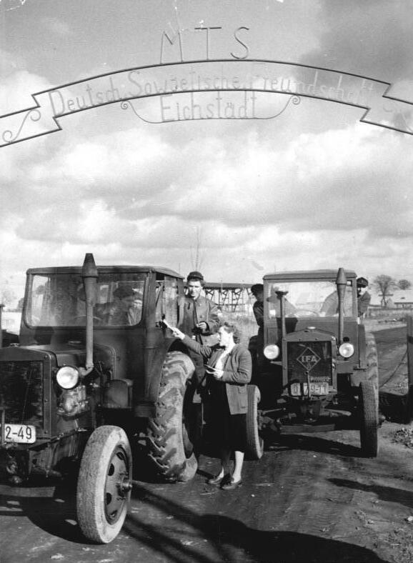 Eichstädt, Ausfahrt der MTS Zentralbild Sturm 12 Mot. 30.10.1954 Ernte-Echo, die Dorfzeitung der MTS Deutsch-Sowjetische Freundschaft in Eichstädt bei Velten. UBz: (siehe Begleittext). Bertha Hennicke, Mitglied der Redaktionskommission des Ernte Echo und Pförtner in der MTS kontrolliert die Papiere der Traktoristen, bevor sie aufs Feld fahren.